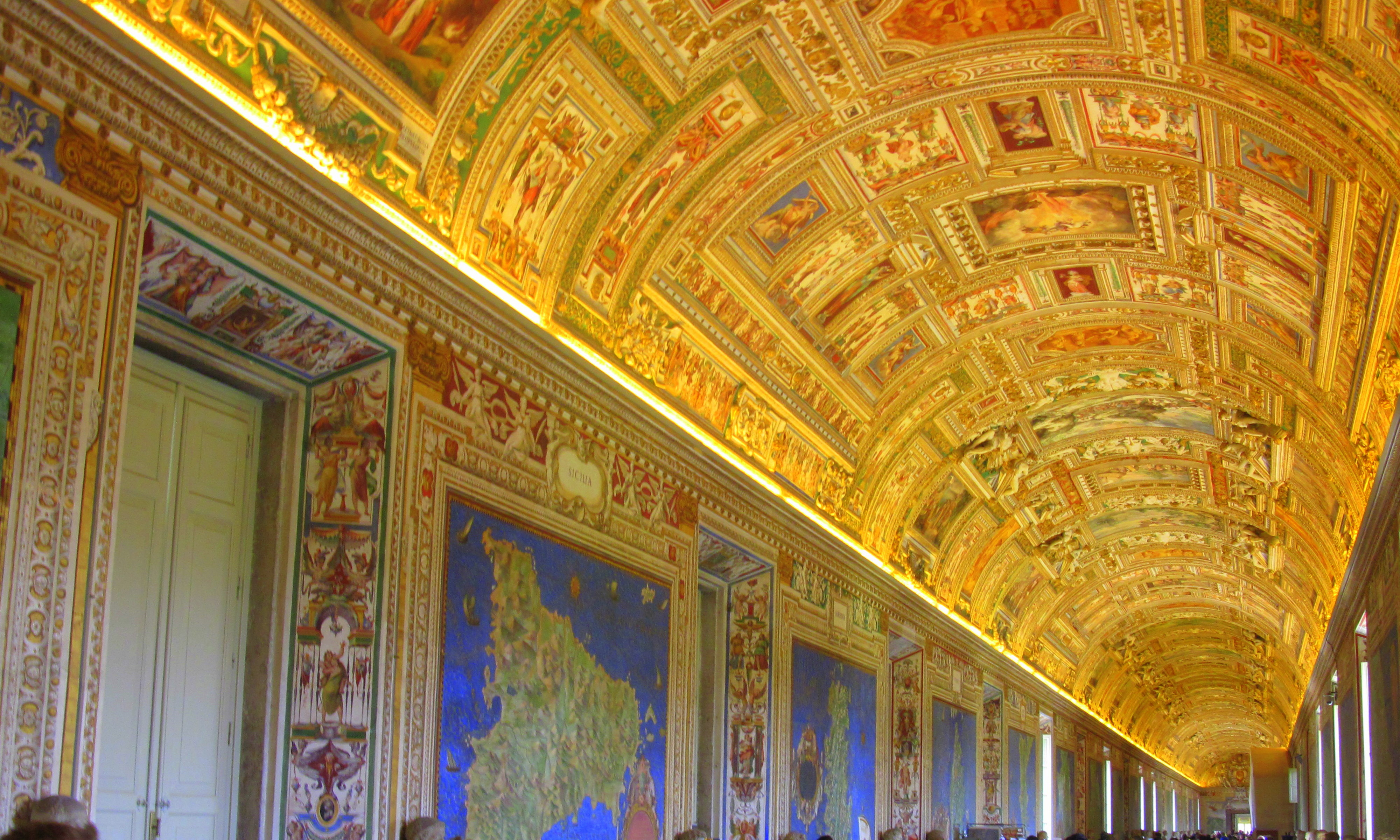 Галерея геокарт